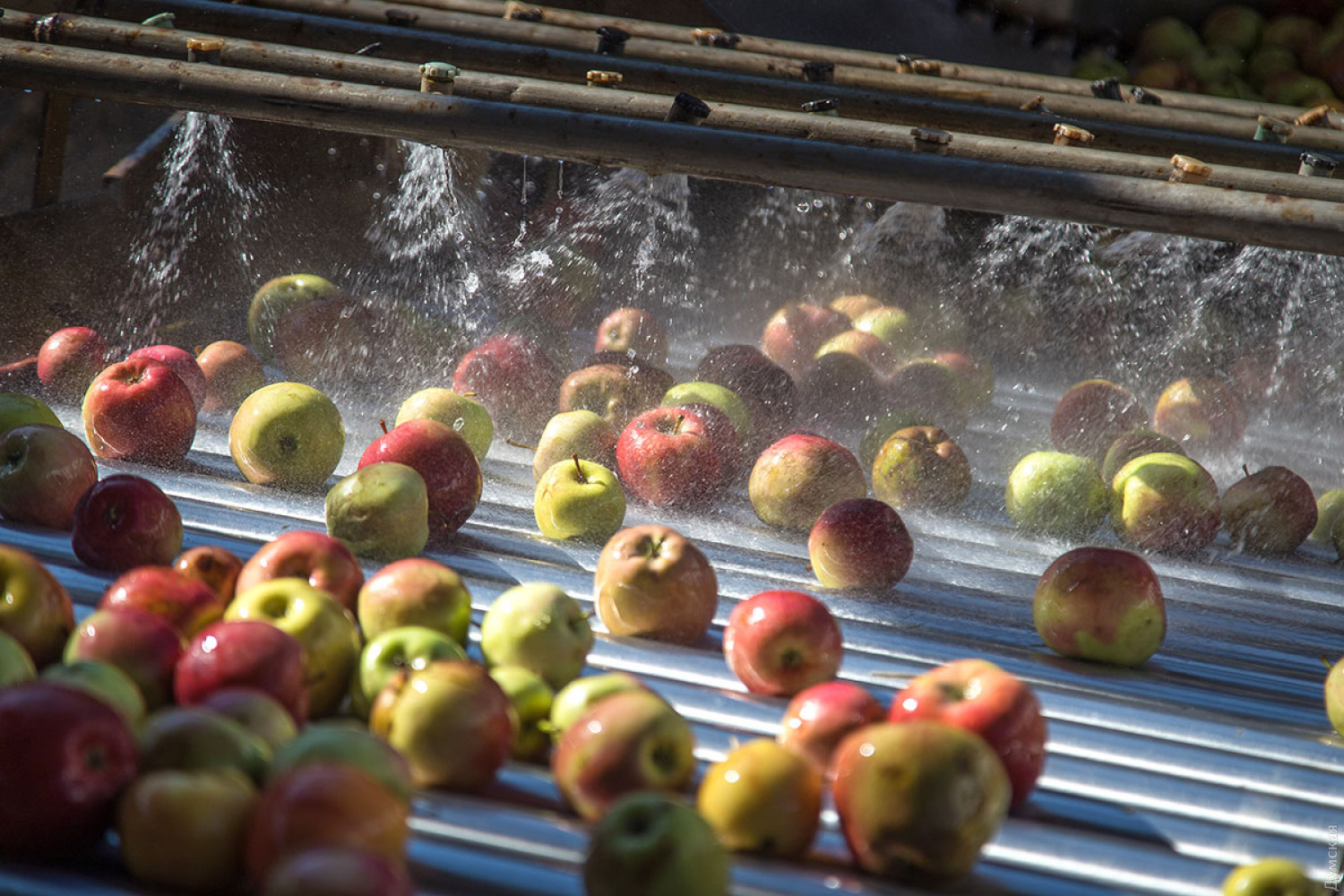 Линия очистки и подготовки сырья